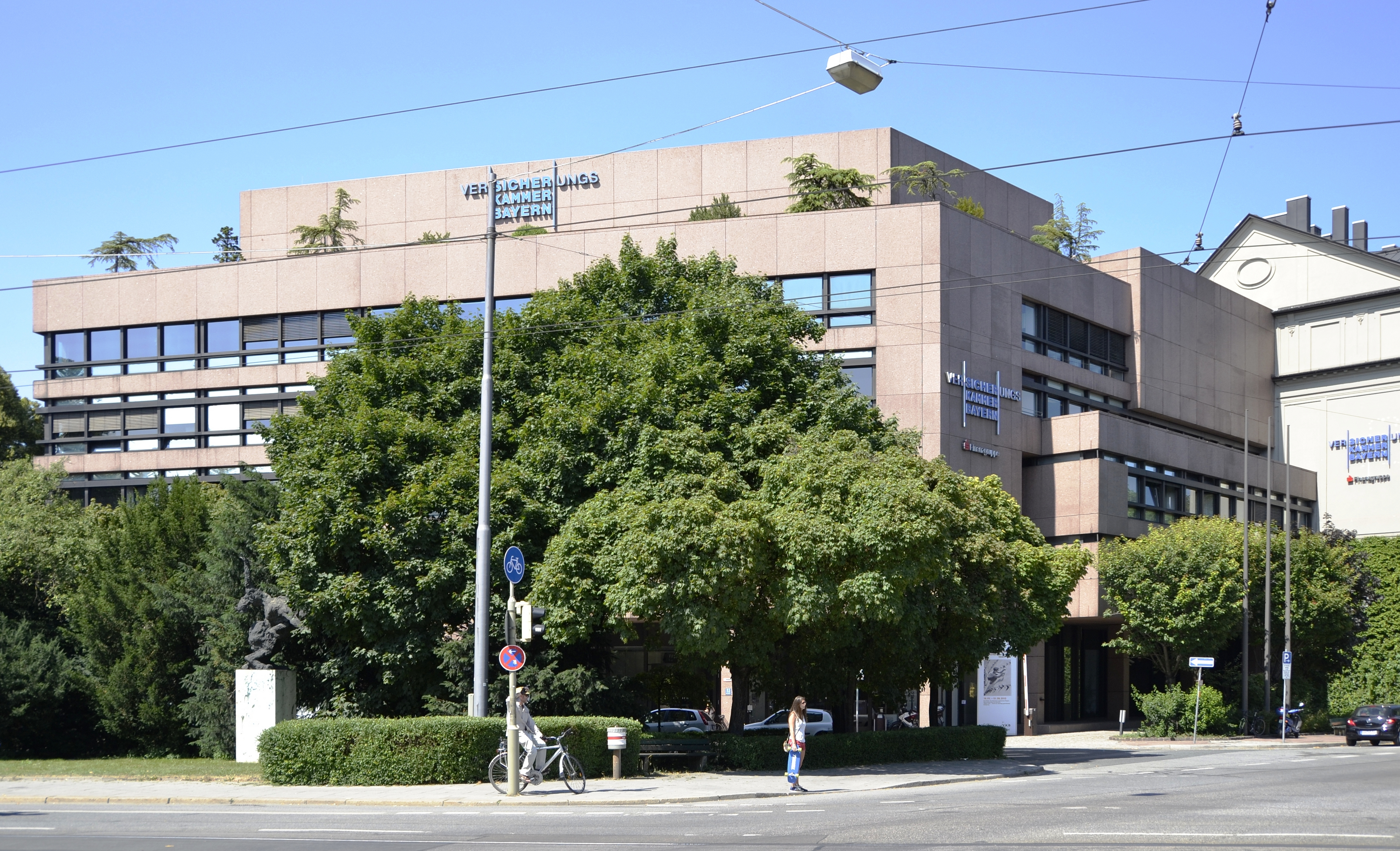 Sitz der Versicherungskammer Bayern (Maximilianstraße 53, 80538 München) in München-Lehel.